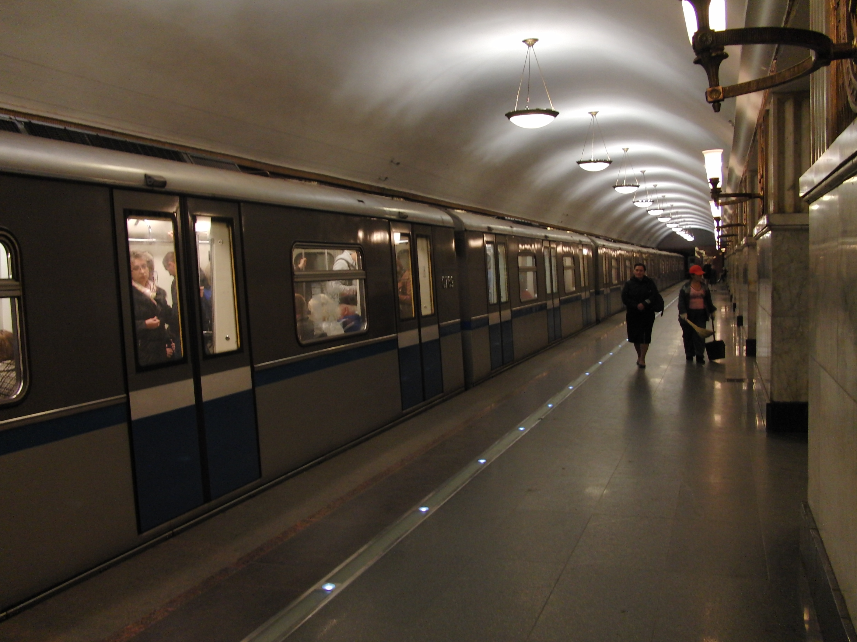 Elektrozavodskaya (Электрозаводская)